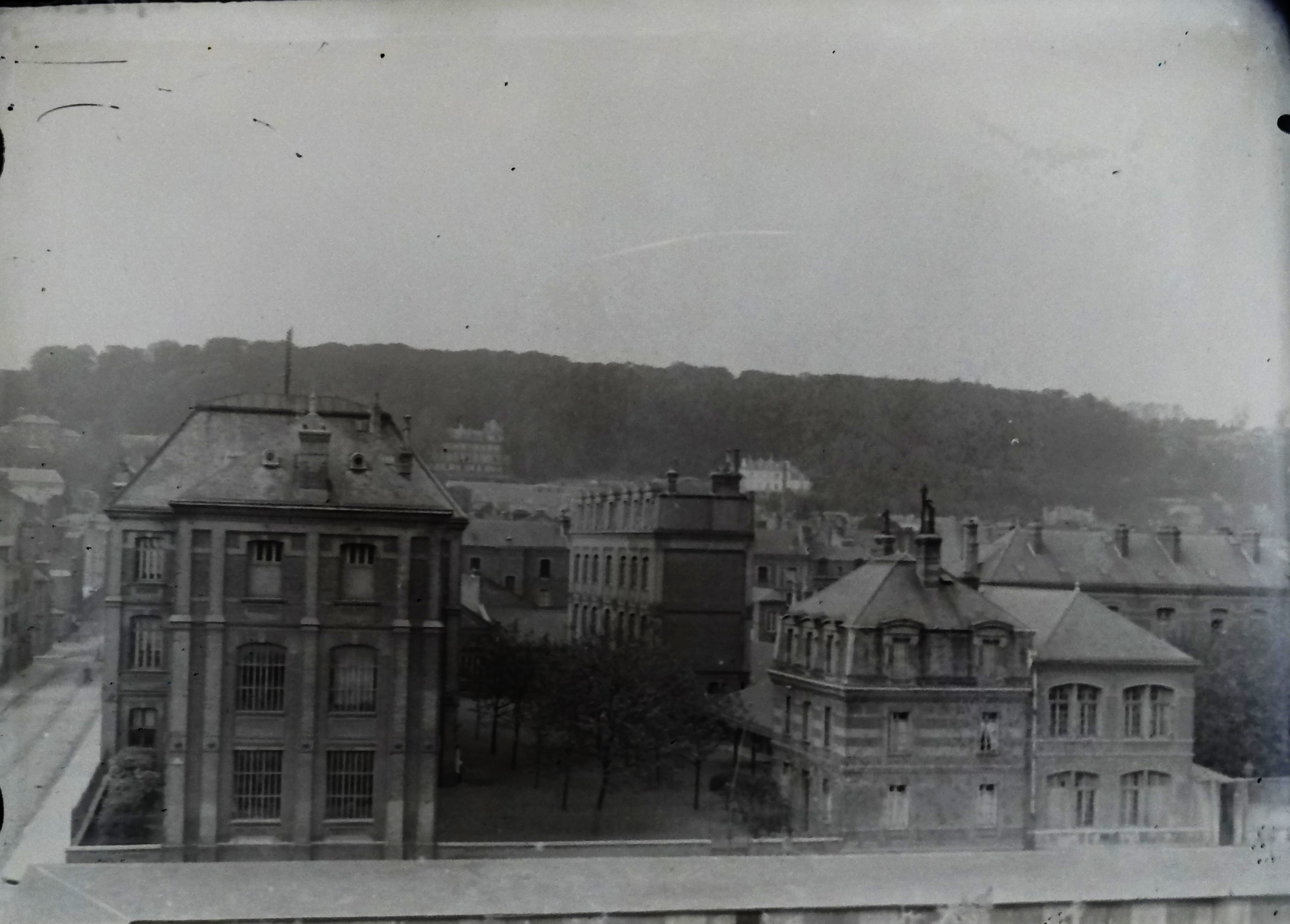 Photographie du lycée dans les années 1900